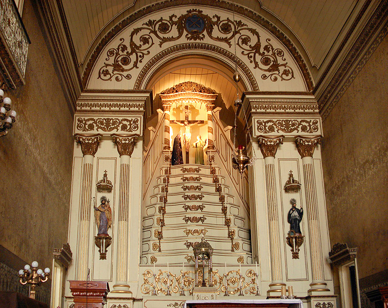 Altar principal da Igreja das Dores, Porto Alegre, Brasil; com o sétimo Passo da Paixão: Jesus é crucificado.